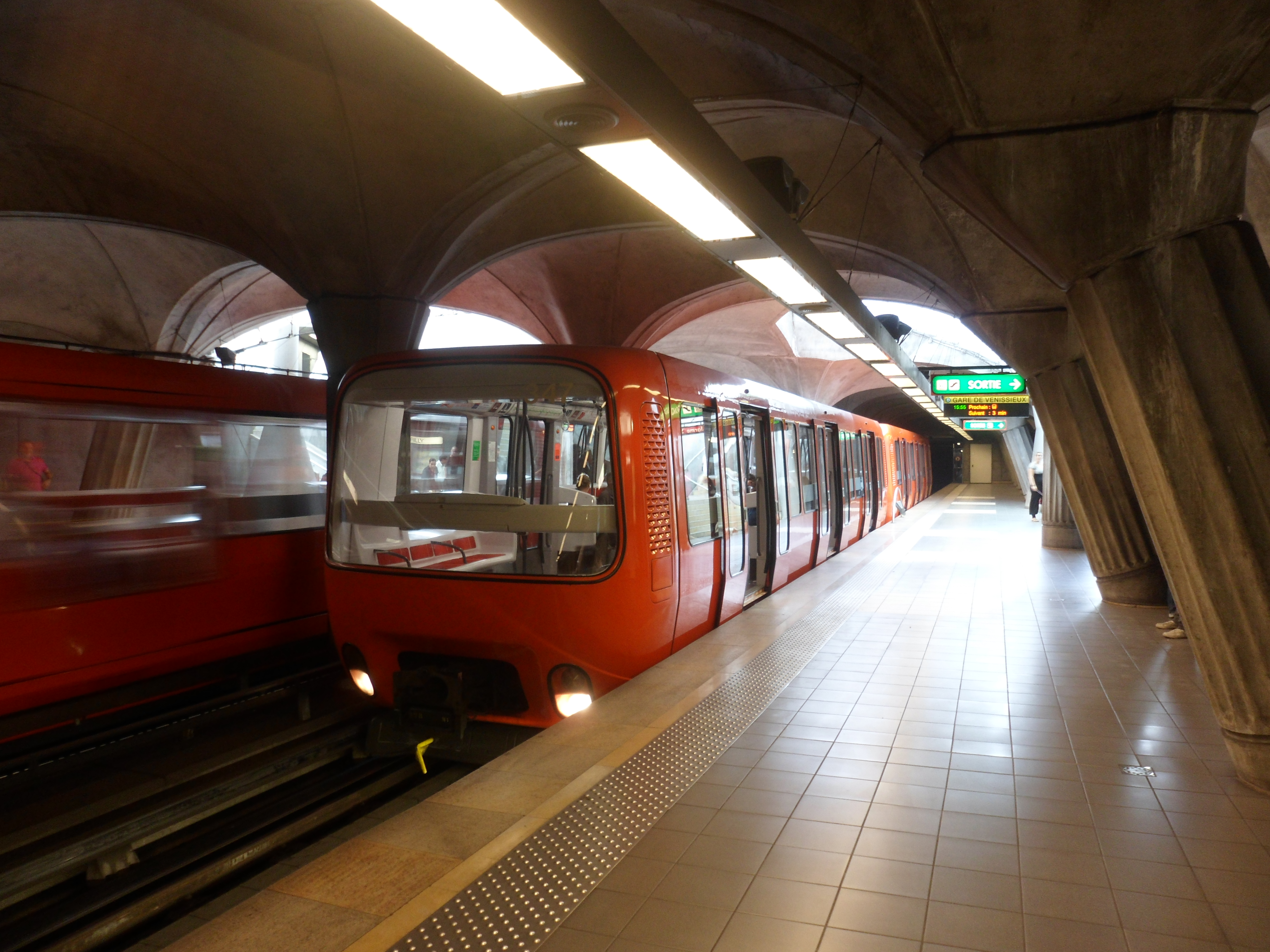 Un MPL85 de la ligne D du métro lyonnais, à la station Parilly